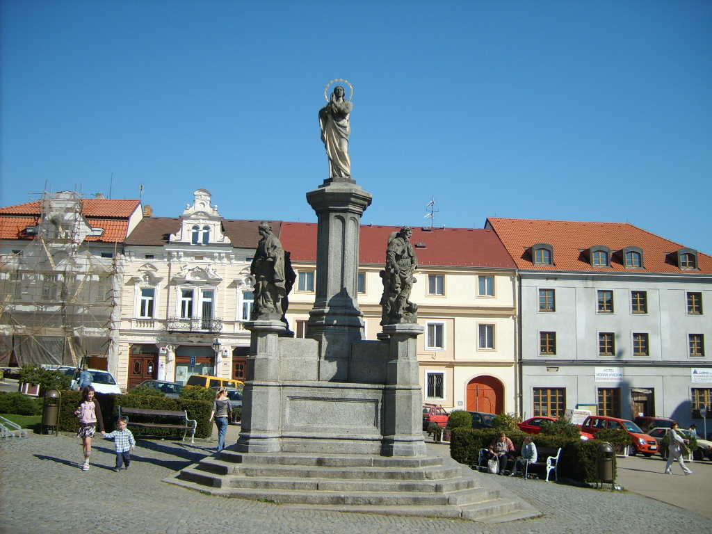 Mariánské sousoší na náměstí ve Voticích.